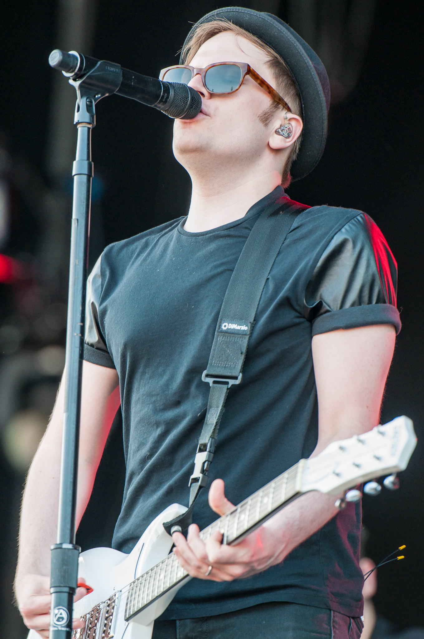 ARGO-Konzerte,Centerstage,Fall Out Boy,Konzert,Livekonzert,Livemusik,Musik,Patrick Stump,RiP,Rock im Park 2014